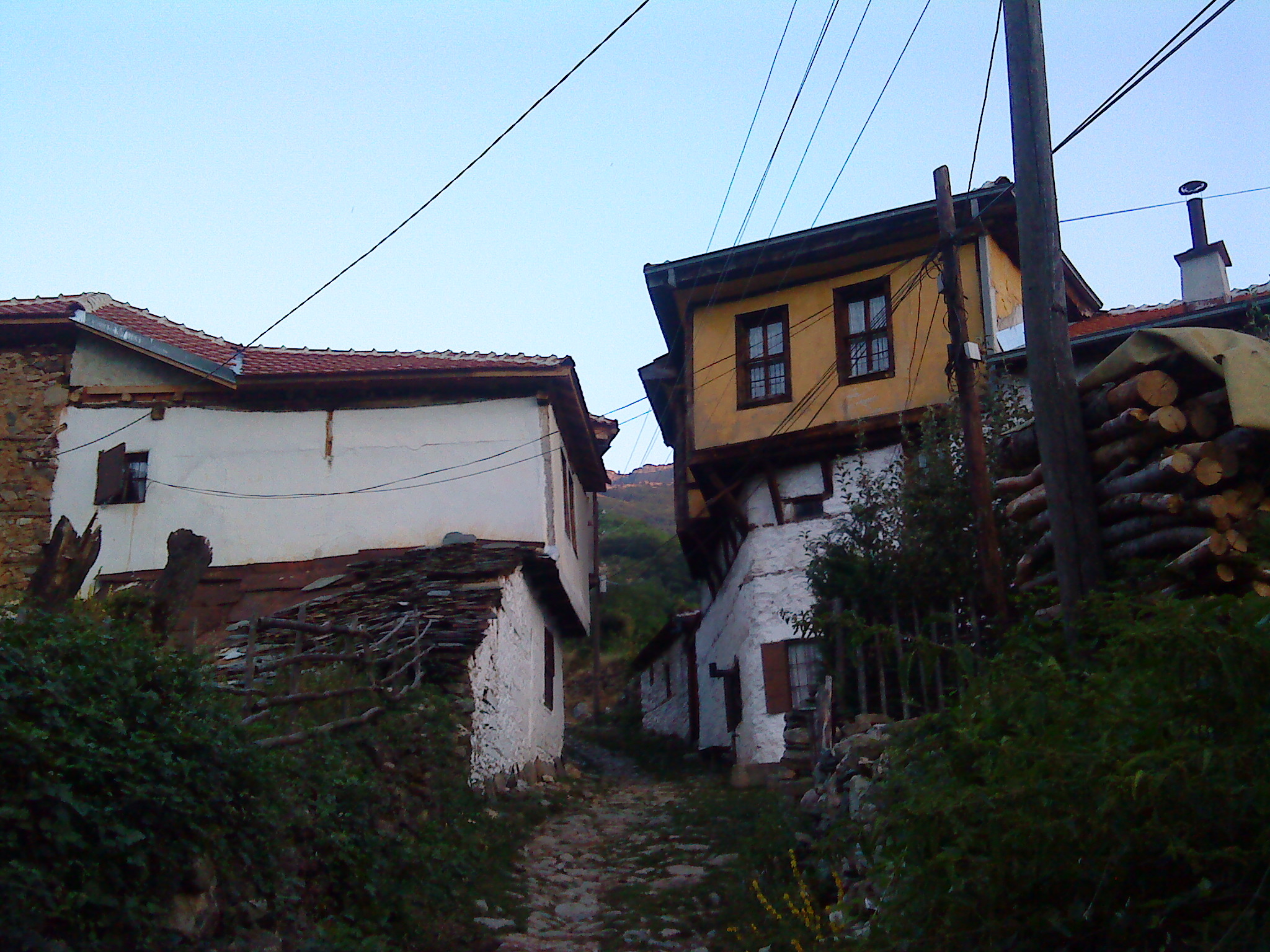 Архитектура село Маловиште